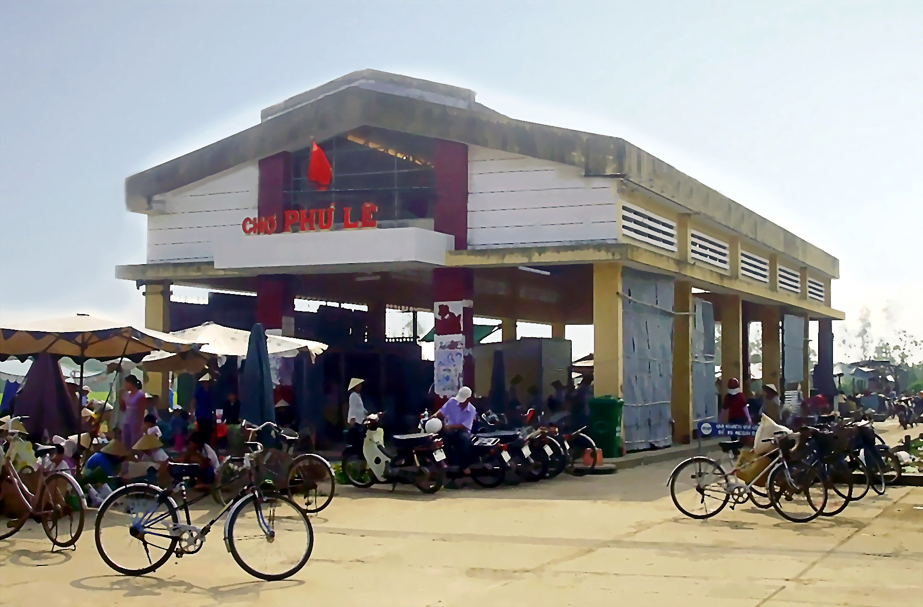 Chợ xã Phú Lễ, thuộc huyện Ba tri, tỉnh Bến Tre, Việt Nam.